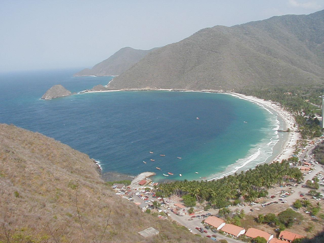 Esta es una foto tomada desde el mirador que se encuentra en la carretera para ir a Cata.